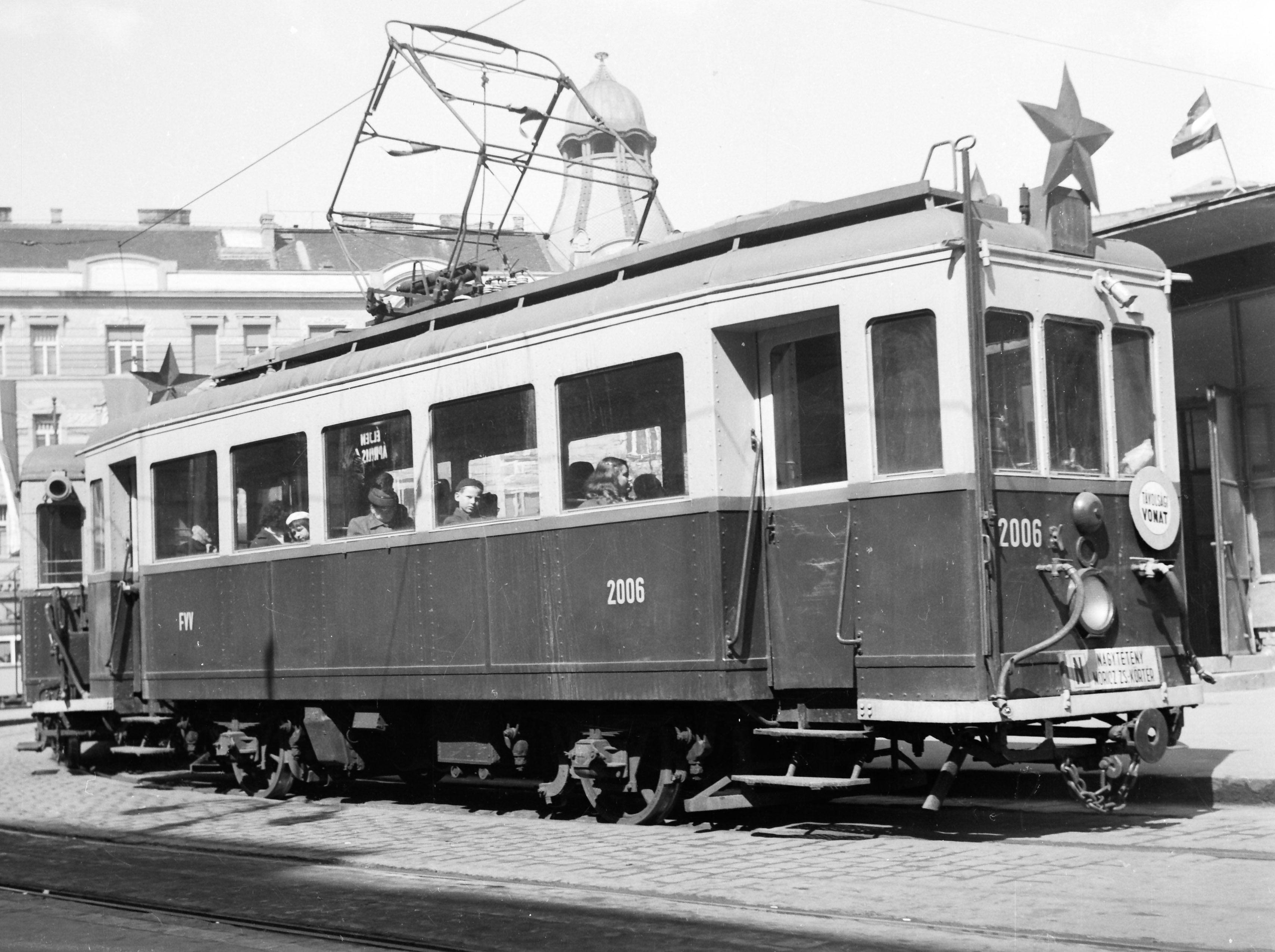 Móricz Zsigmond körtér. Location: Hungary, Budapest XI. Tags: commuter train, Red Star, Budapest Title: Móricz Zsigmond körtér.